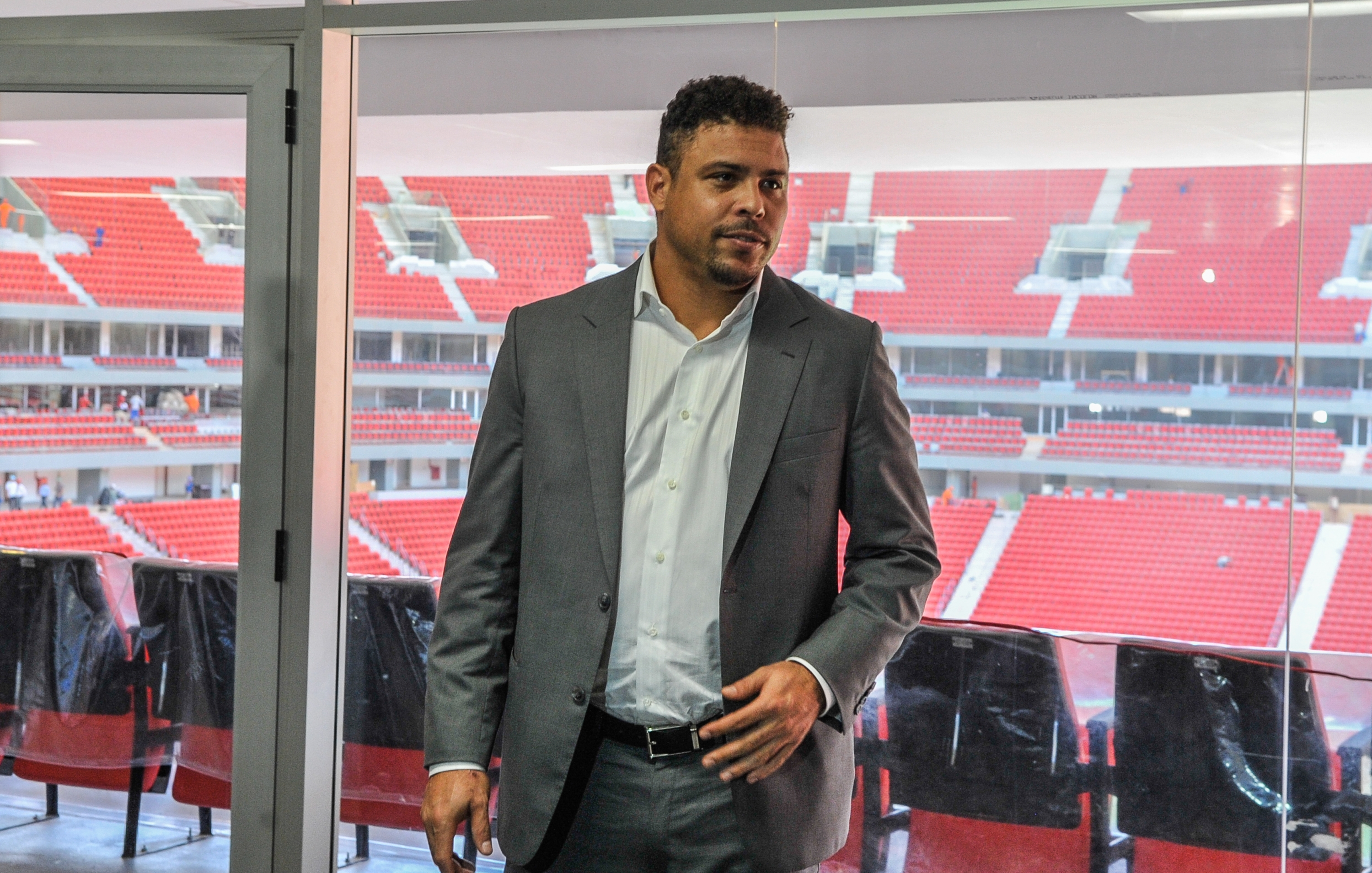 Uma comitiva da FIFA, do Conselho Administrativo do Comitê Organizador Local (COL) e do Governo Federal, visita o Estádio Nacional de Brasília Mané Garrincha. Na foto, o ex-jogador, Ronaldo